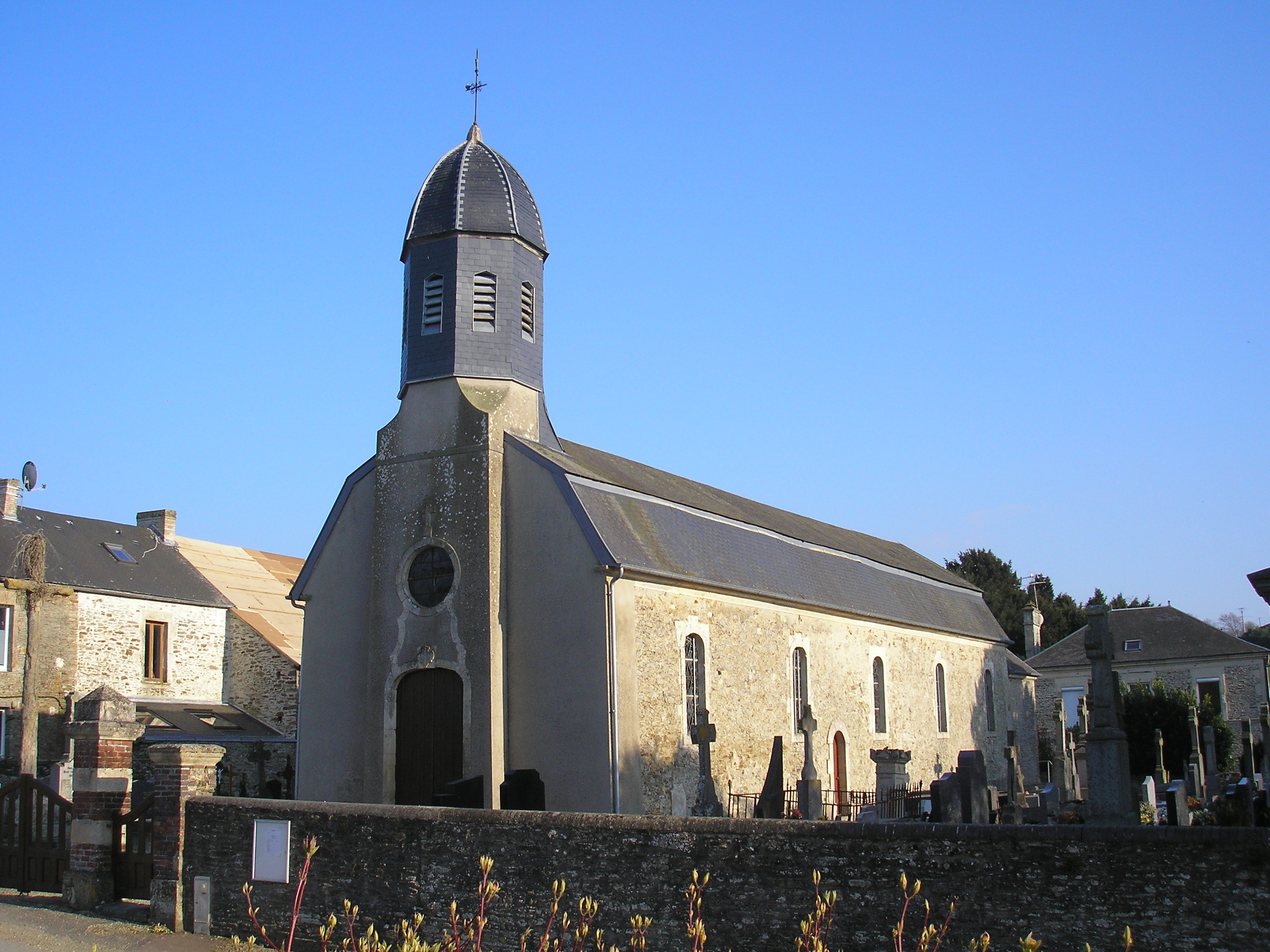 Coulvain (Normandie, France). L'église Saint-Vigor.